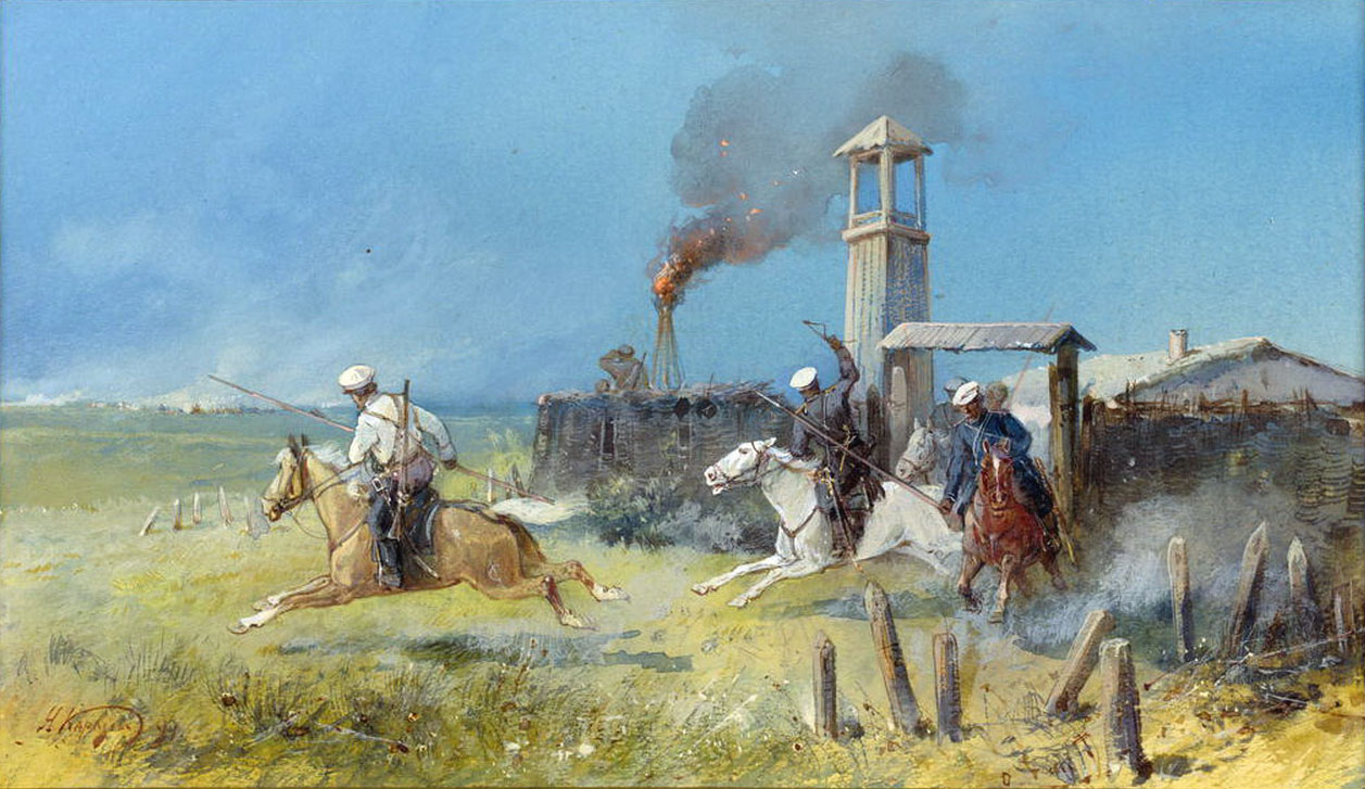 Nikolay Karazin (1842-1908). The Alarm in the fortress redoubt (The attack of Khoqand's on the Cossack settlement Uzun-Agach). 1891 Николай Николаевич Каразин. Тревога в крепостном редуте (Нападение кокандцев на казачий выселок Узун–Агач)